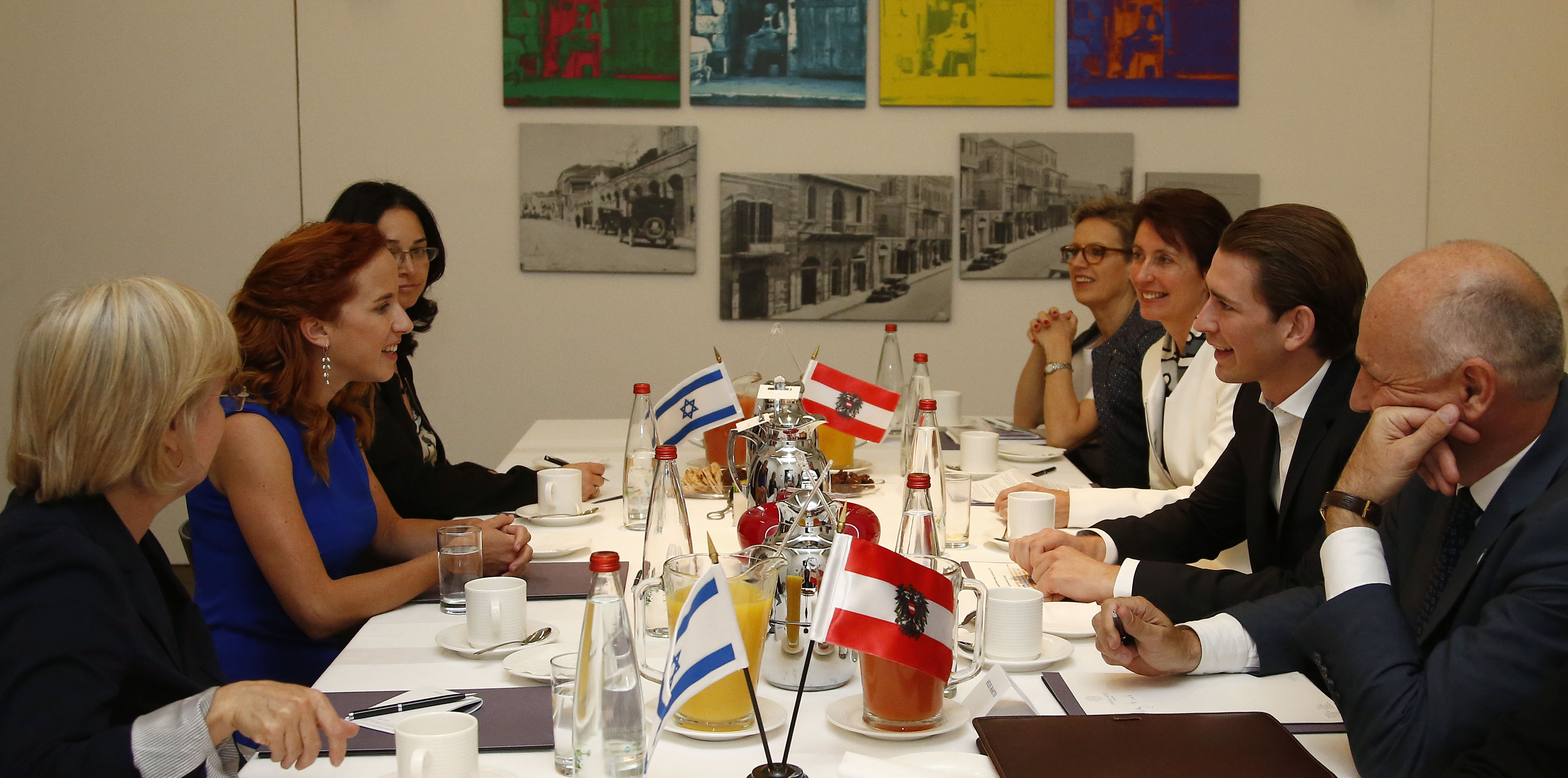 Arbeitsbesuch Israel. Bundesminister Kurz trifft die Knesset Abgeordnete Stav Shaffir. Jerusalem. 16.05.2016, Foto: Dragan Tatic Sebastian Kurz visit to Israel, May 2016